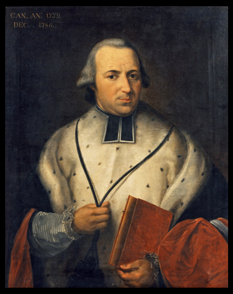 Chanoine de Soignies